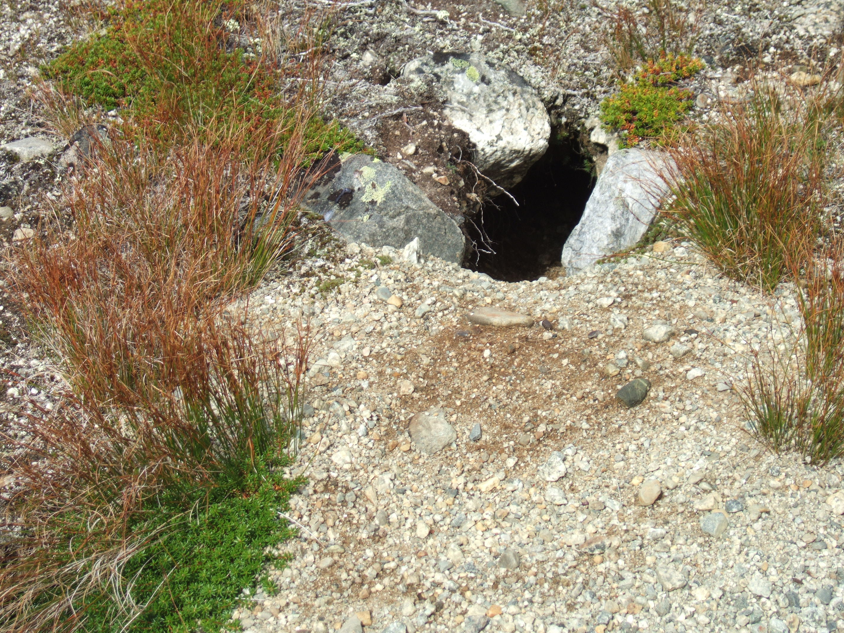 Hi i en liten endemorene i Narvikfjella i Narvik kommune i Nordland. Kanskje tilhører det en fjellrev?